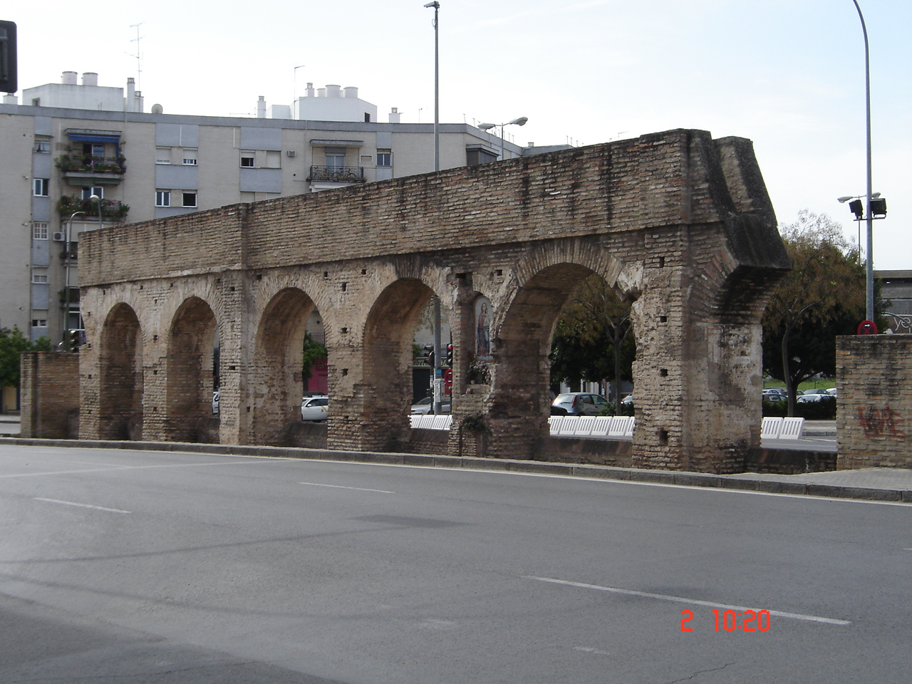 Restos de acueducto romano (la tercera arcada) conocido como "Caños de Carmona" en Sevilla.